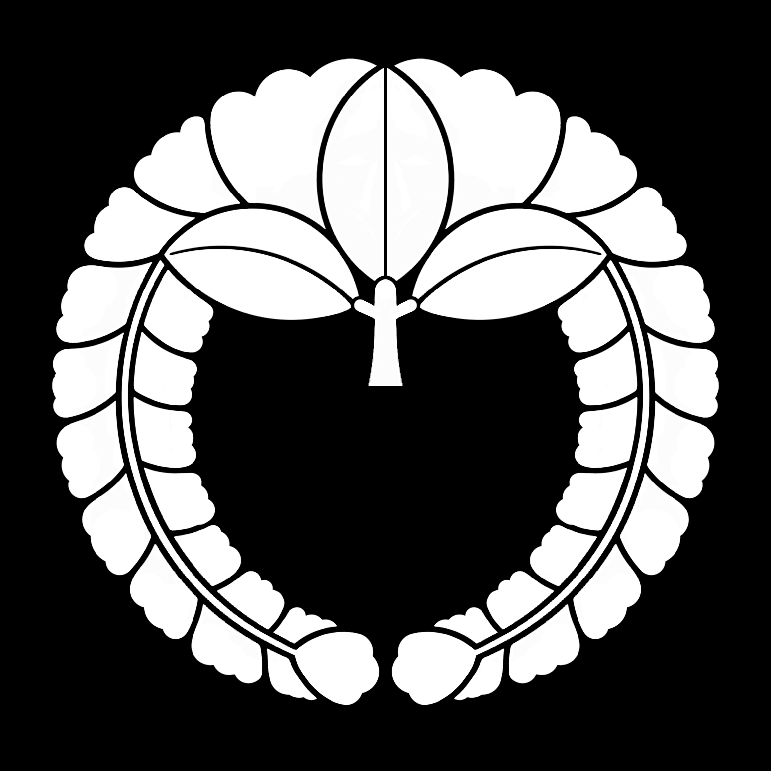 「下がり藤」紋（染抜）